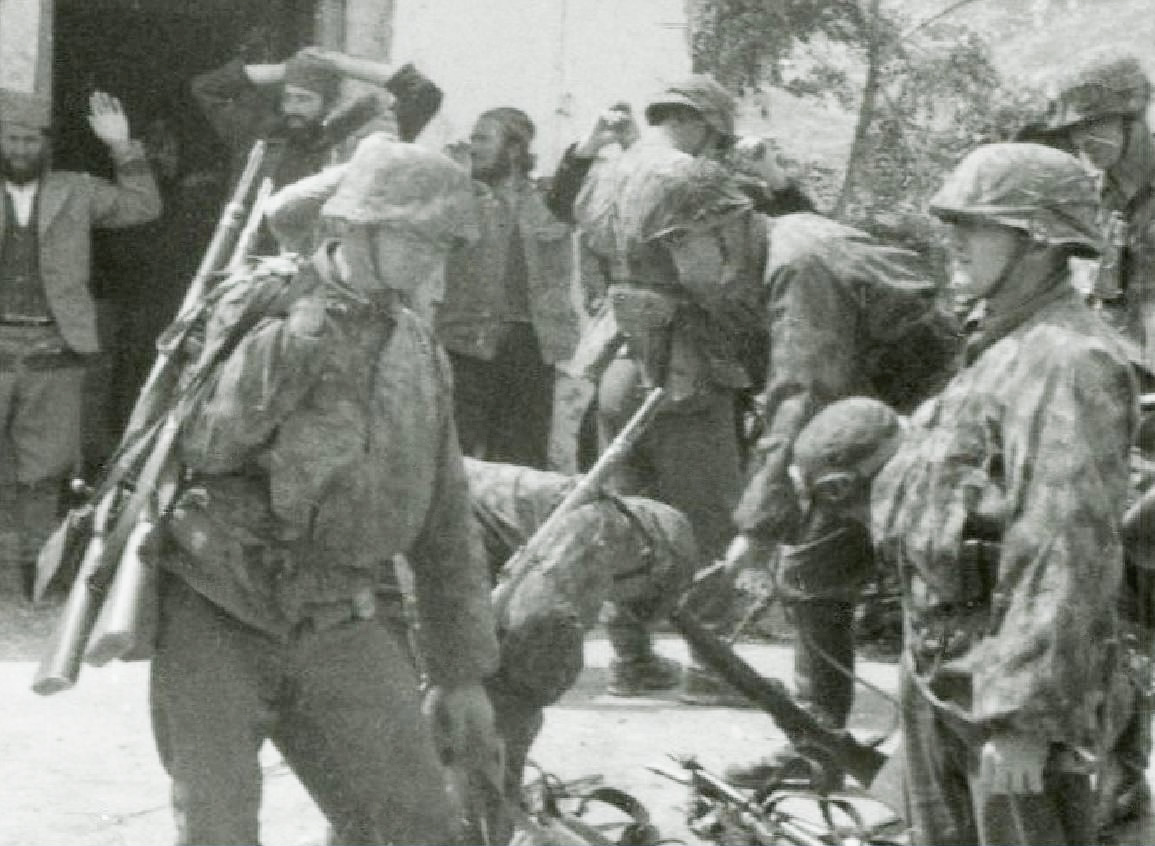 Soldati della 7. Divisione da montagna delle SS "Prinz Eugen" durante un'operazione antipartigiana in Jugoslavia